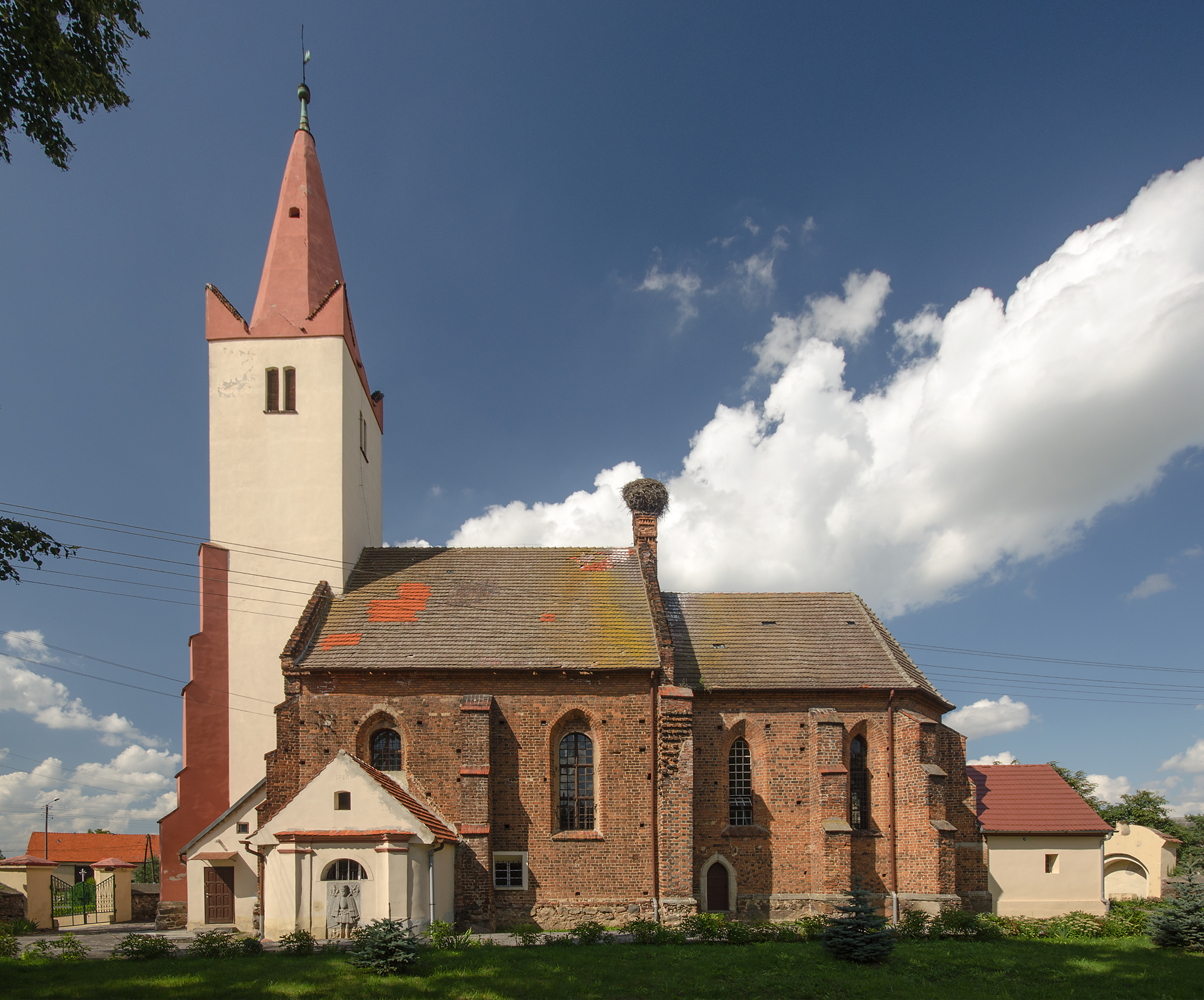 Lipowa - rzymskokatolicki kościół parafialny p.w. św. Marcina, XV/XVI